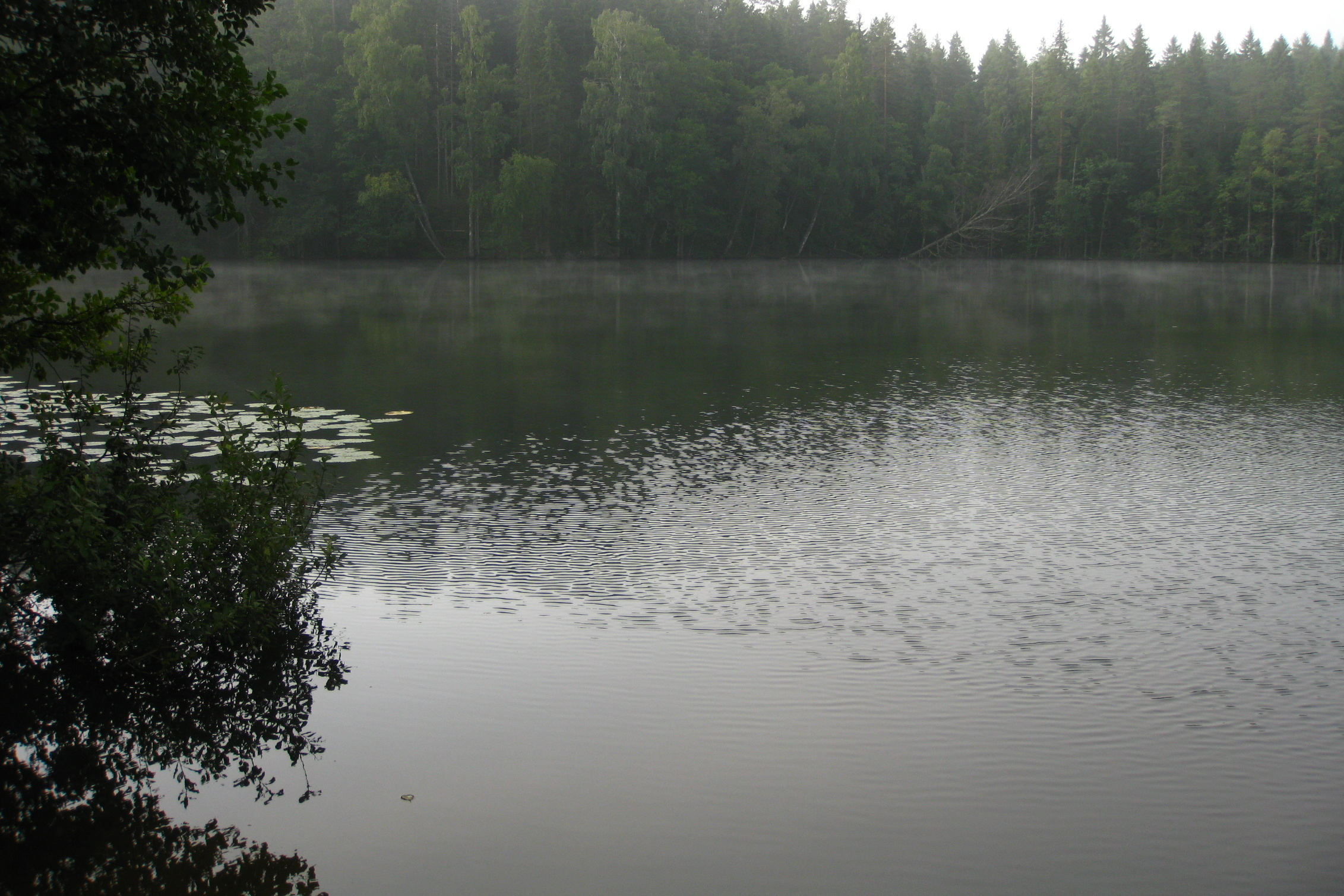 Järvi Pärnjärve läänekaldal